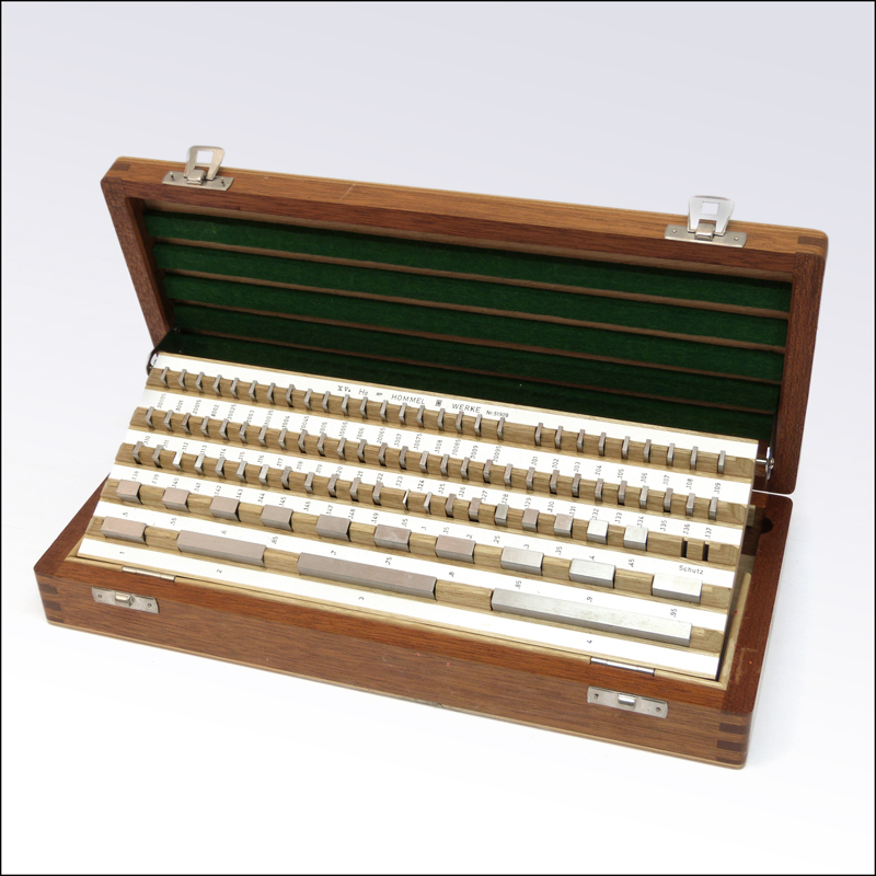 zölliger Parallelendmaßsatz der Hommelwerke